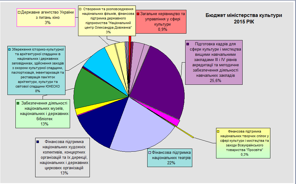 Бюджет міністерства культури. На основі додатку до Закону України Про Державний бюджет України на 2015 рік. Джерело